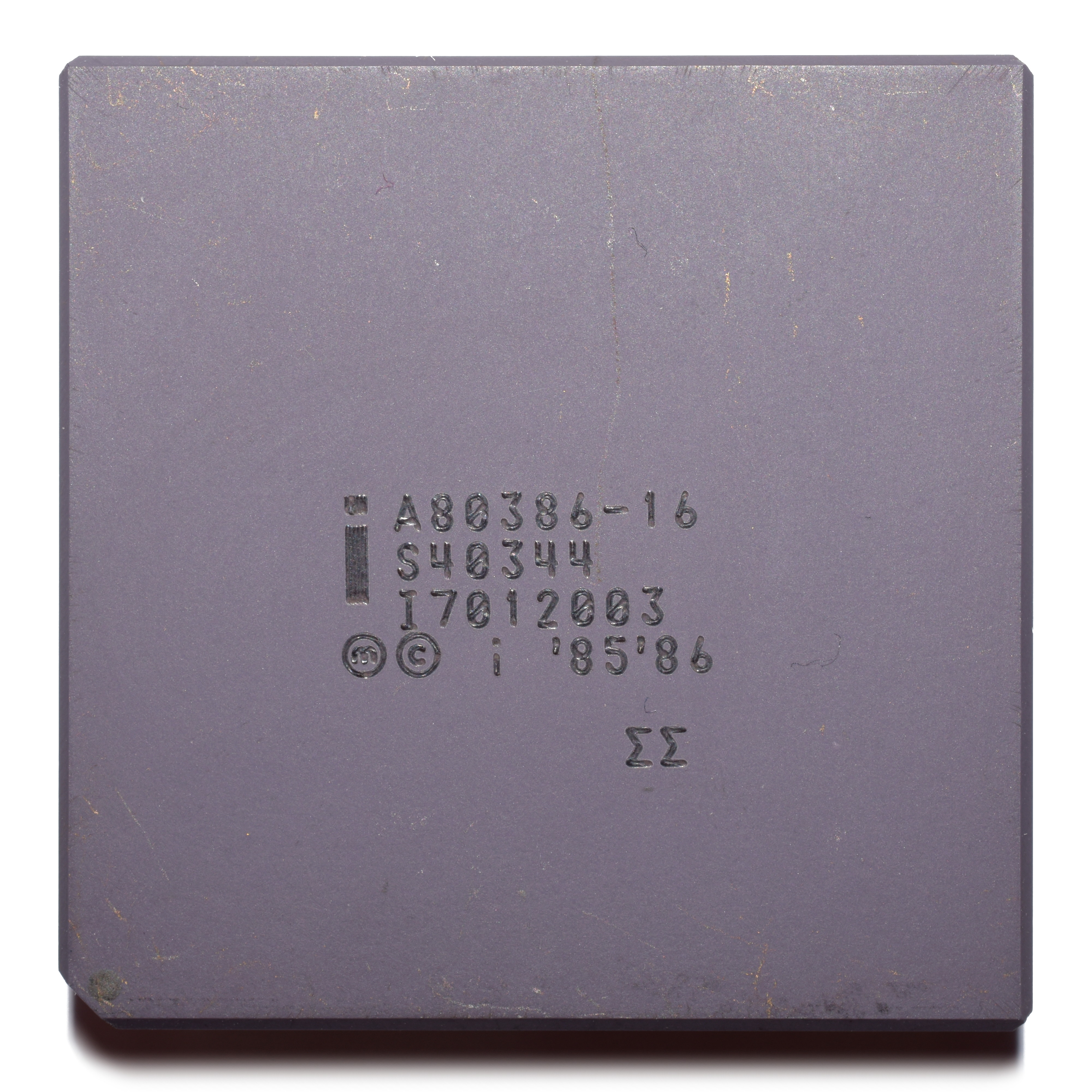 Procesoro Intel A80386-16 kun "ΣΣ" teksto.